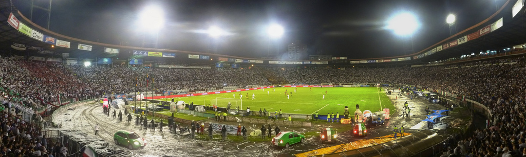 Panoramica del Estadio Palogrande